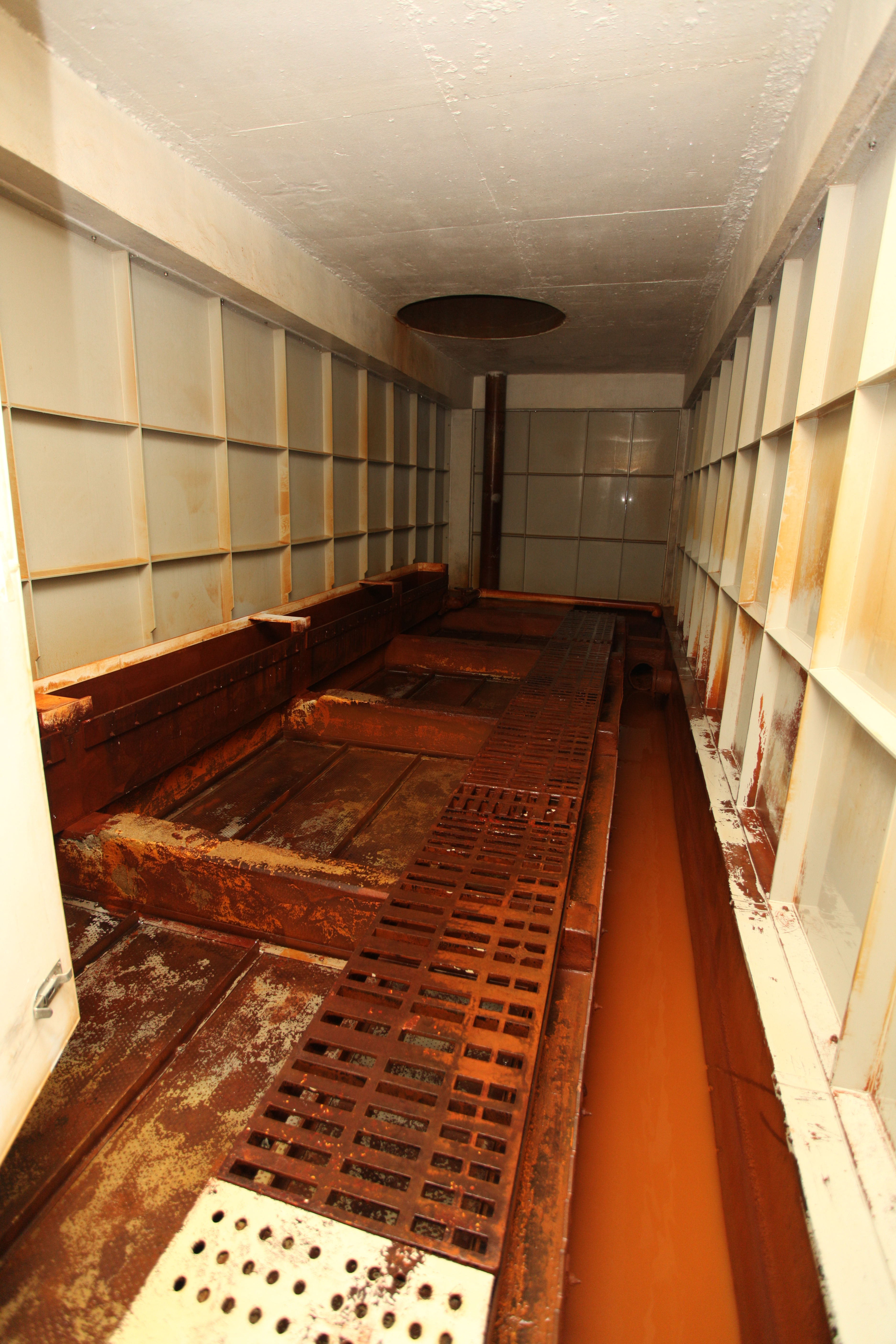 Prázdná vana aerační místnosti pro odželezňování artézské vody, úpravna vod Káraný. Artéská voda je jímána ze 7 vrtů o hloubce 60-80 m východně od obce Káraný a násoskou (= vzduchotěsné potrubí dopravující vodu, díky podtlaku tvořenému vývěvou) přiváděny do odželezovny v úpravně vod Káraný. Tato voda pochází ze zvodně (= souvislá akumulace podzemní vody v propustném horizontu) cenomanských (= časová jednotka svrchní křídy vymezující období před 99,6-93,5 miliony let) pískovců o mocnosti 20-30 m překrytých vrstvou nepropustných slínovců. Označení artéská voda pochází z francouzské provincie Artois, kde byla obdobná voda čerpána mnichy kartuziánského řádu ve 12. století. Voda do Polabí přitéká propustnými pískovci shora od Ještědského hřbetu. Rychlost je však malá, stáří vody bylo odhadnuto na 14 000 let. Díky vysokému obsahu železa je tato voda podrobena odželeznění. To se skládá z aerace a následné rychlofiltrace přes písek. Aerace neboli provzdušnění se provádí v uzavřené, dobře odvětratelné místnosti s vanami. V této fázi dojde k vyvločkování dvojmocného rozpuštěného železa vázaného v solích na dvojmocné nerozpustné. To je následně zachyceno na pískových zrnech rychlofiltru. Vany této místnosti jsou relativně mělké a vzduch je do nich vháněn zespoda, tak že dochází k jeho probublávání na povrch. Zároveň také dochází k odstranění plynů ve vodě obsažených (např. sirovodík). Místnost je větrána a přebytečný vzduch pak odchází pryč. Jednou za rok se vany v aerační místnosti čistí od usazeného železa. Nová odželezovna byla v Káraném vybudována v roce 1978. Zdroje: 1) Křivánek, Oldřich a Kněžek, Miroslav. 2001. Zdroje pitné vody v Káraném. Principy získávání vody v oblasti káranské vodárny. Pražské vodovody a kanalizace a.s. 2) Wikipedie 3) Ambrožová, Jana. 2007. Aplikovaná a technická hydrobiologie. VŠCHT.